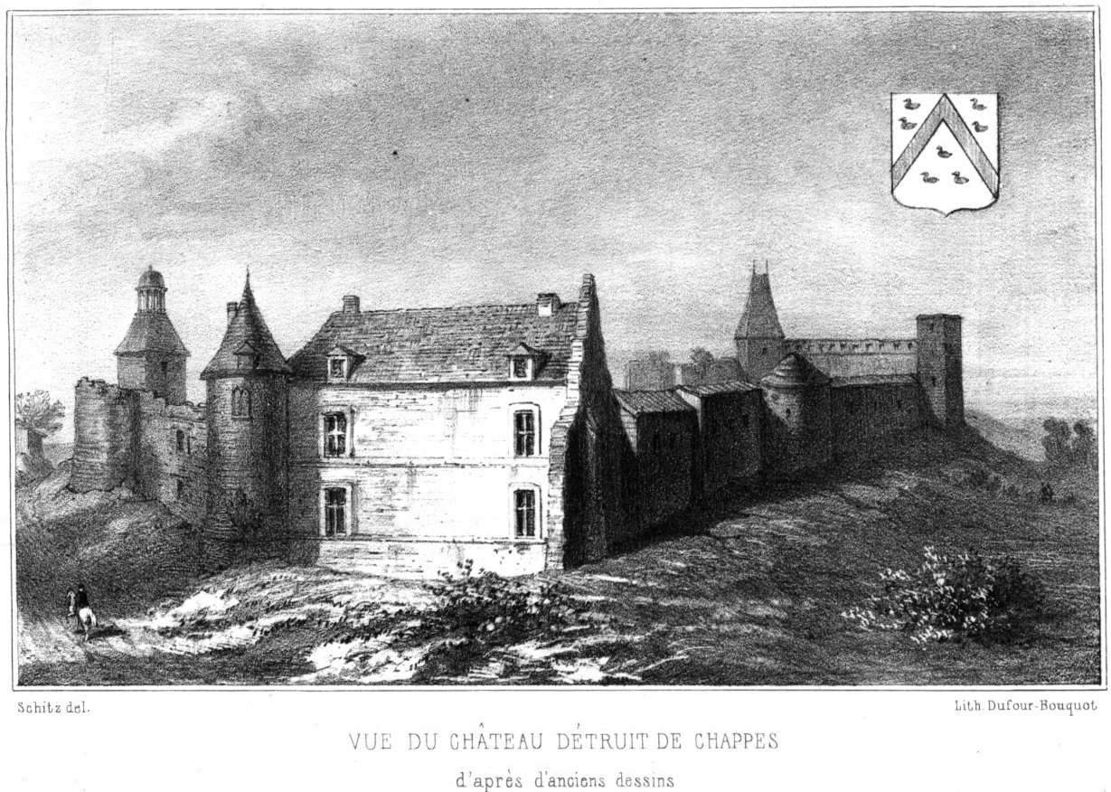 Ancien château de Chappes (Aube)